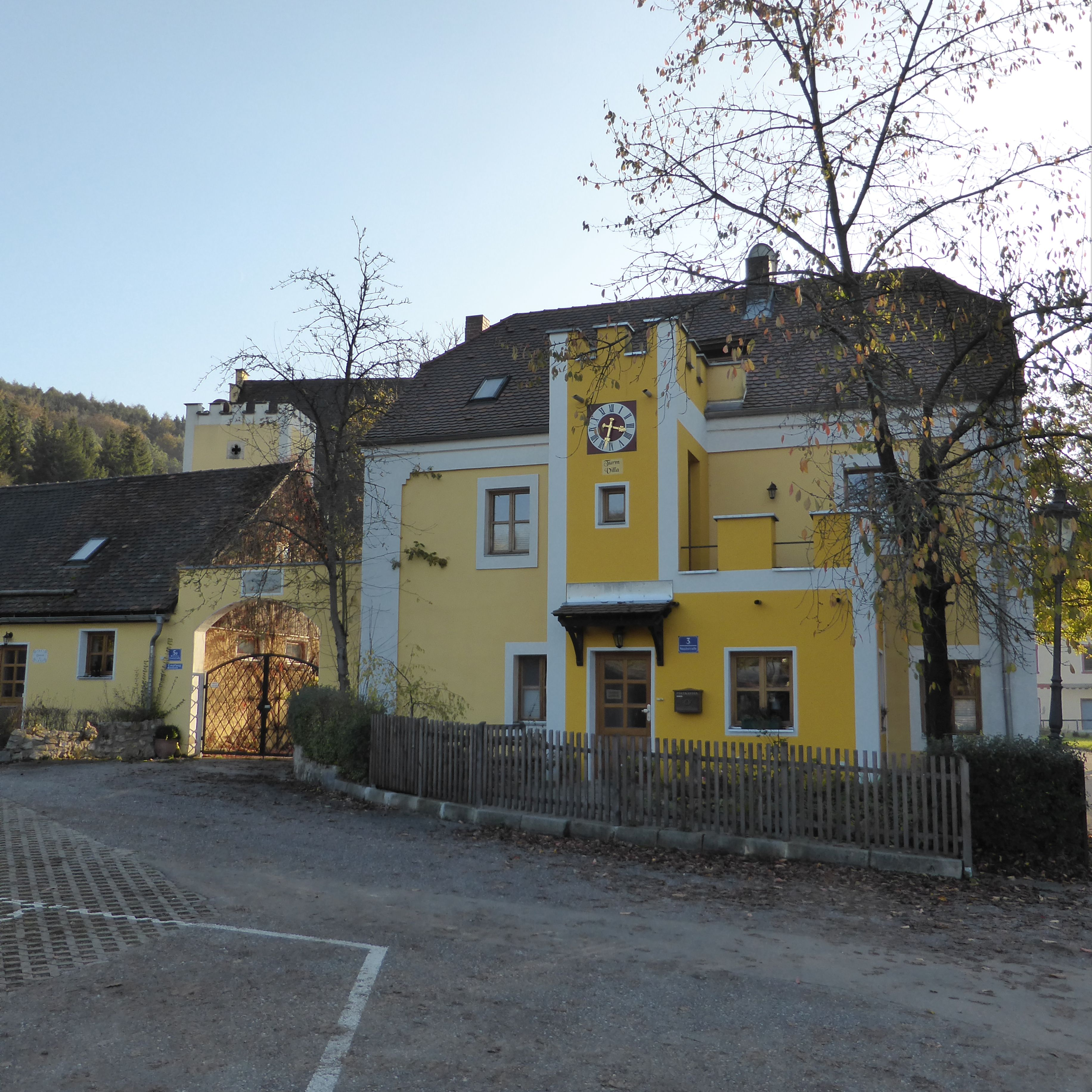 Heitzenhofen ((Hofmarksschloss)